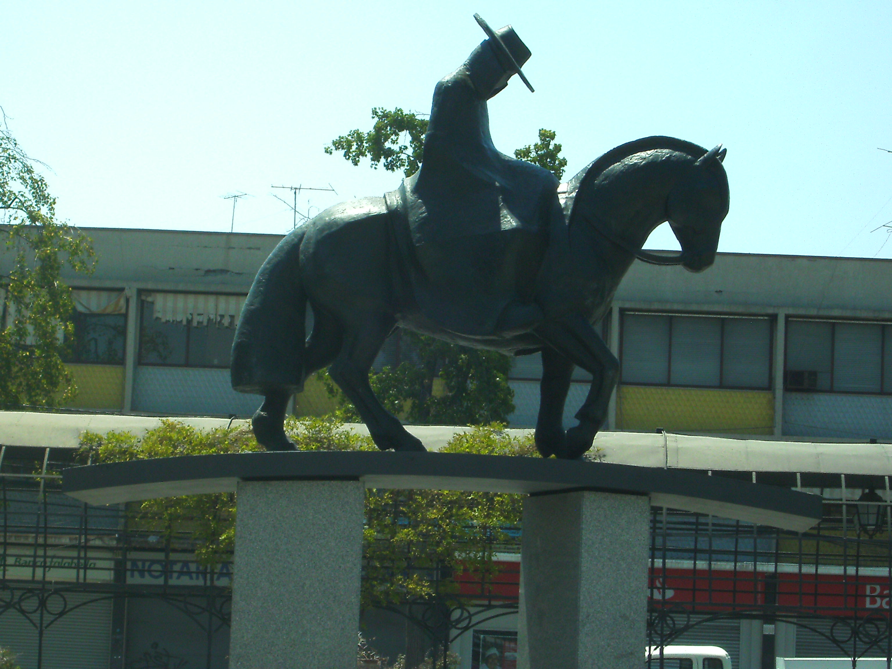 Estatua al heroe de la Independencia de Chile, visto desde la perspectiva de los Puentealtinos, es decir como un viajero anónimo camino a Argentina